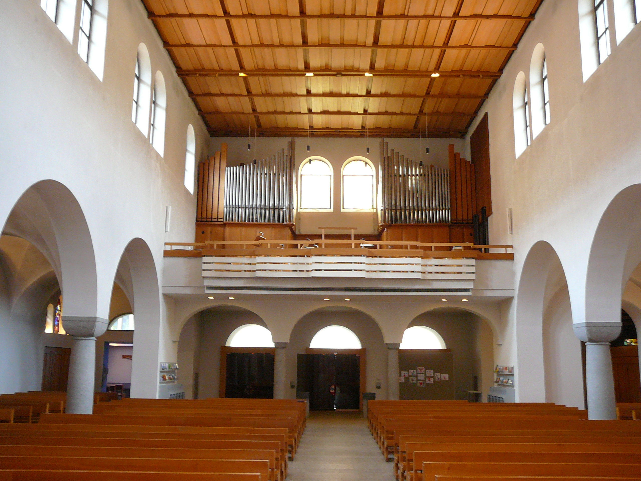 Römisch-katholische Kirche Herz Jesu Zürich-Wiedikon, Blick zur Empore